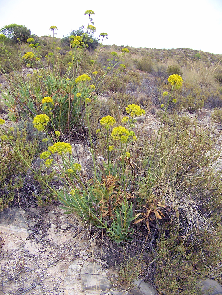 Bupleurum gibraltarium (Crujía, Cuchilleja) - Vista general en flor - Senda del Puch, circa Paso de las Yegüas, Monte del San Cayetano, Albatera (Alicante, España).